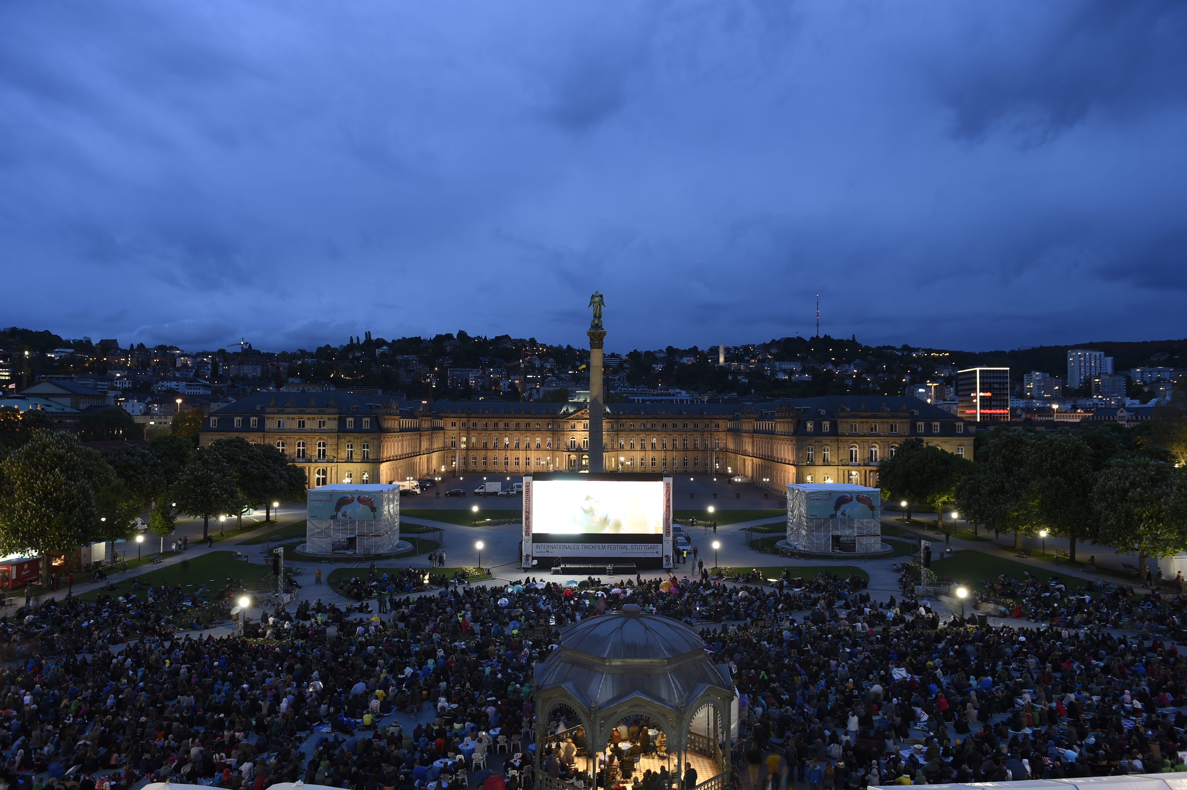 The big open air cinema at the city centre in Stuttgart.